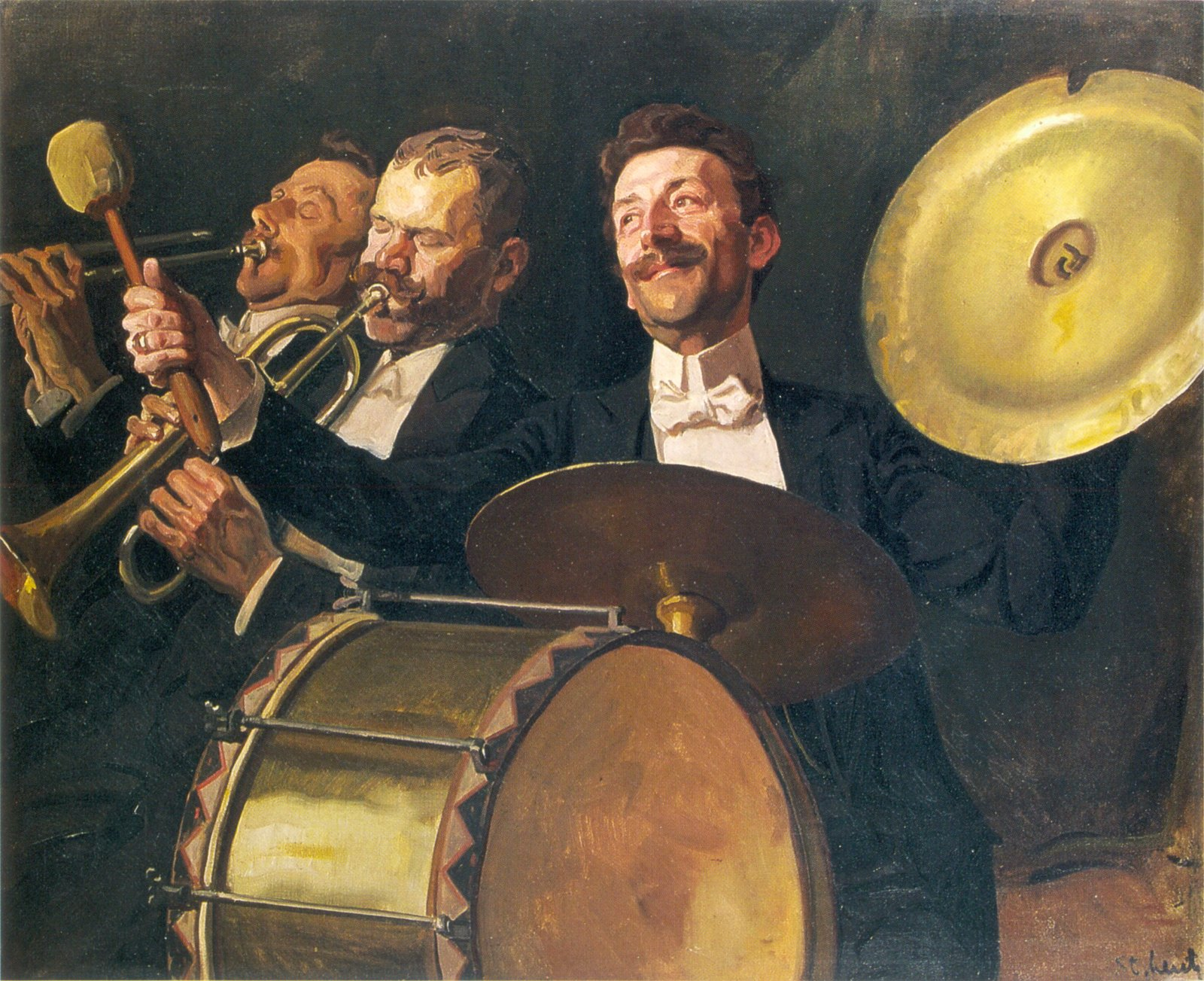 Fanfara - Serenada